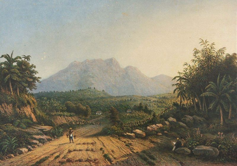 Litho. Litho naar een oorspronkelijke tekening van J.S.G. Gramberg. Pagina 9 van de map "De Indische Archipel", Den Haag, 1865-1876, met daarin 24 kleurenlitho's, van objectnr. 3728-430 t/m 3728-479.. De berg Prahu gezien vanaf Pelantungan